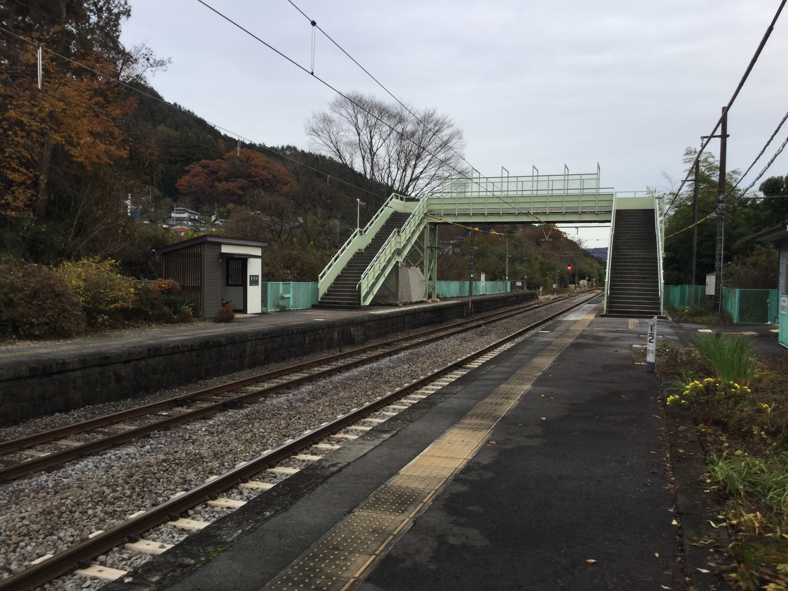 岩島駅のホームと跨線橋